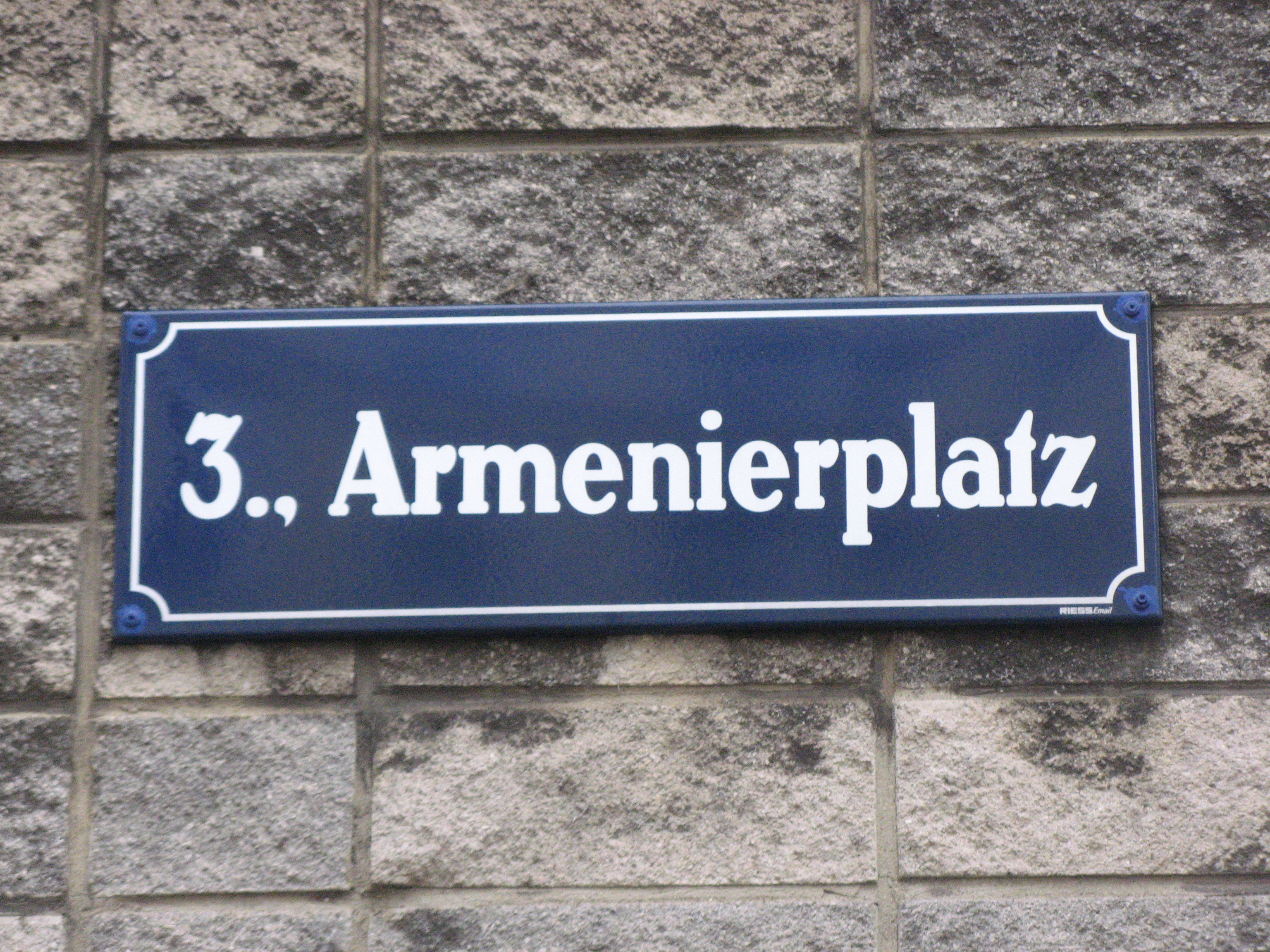 Straßentafel Armenierplatz, Wien-Landstraße